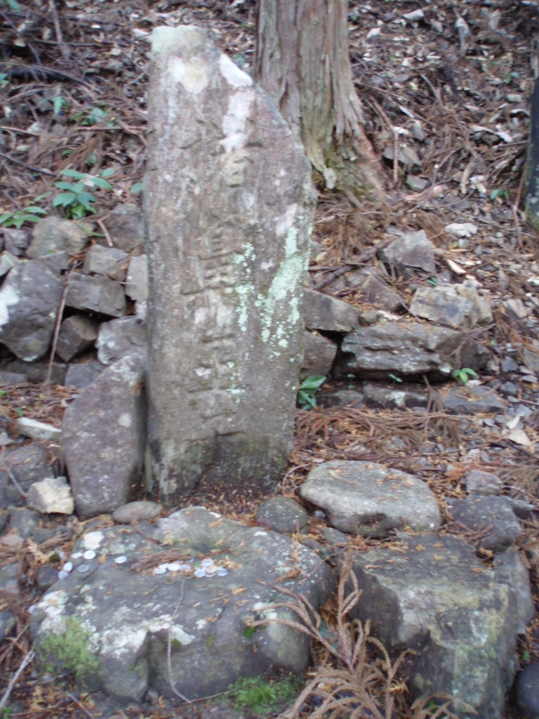 INOHANA-oji monument